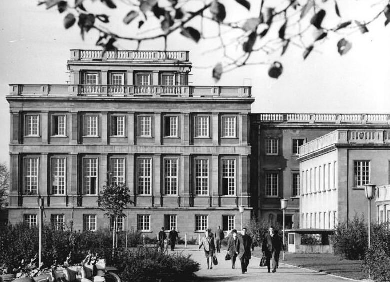 Leipzig, Deutsche Hochschule für Körperkultur und Sport Zentralbild Koch Wen-At 22.10.1965 15 Jahre Deutsche Hochschule für Körperkultur in Leipzig. Eine Teilansicht der DHfK. Information: Am 22.10.1965 feiert die DHfK in Leipzig ihr 15jahriges Bestehen. Dank der großzügigen Unterstützung durch die Regierung unserer Republik ist diese modernste deutsche Sporthochschule zumZentrum der Sportwissenschaft und Forschung, der Ausbildung von Sportlehrern, Trainern und Kadern der sozialistischen Sportbewegung geworden. Auch die Körperkultur der jungen Nationalstaaten fand an der DHfK in Leipzig, an der zahlreiche Studenten aus diesen Ländern eingeschrieben wurden, besondere Unterstützung.